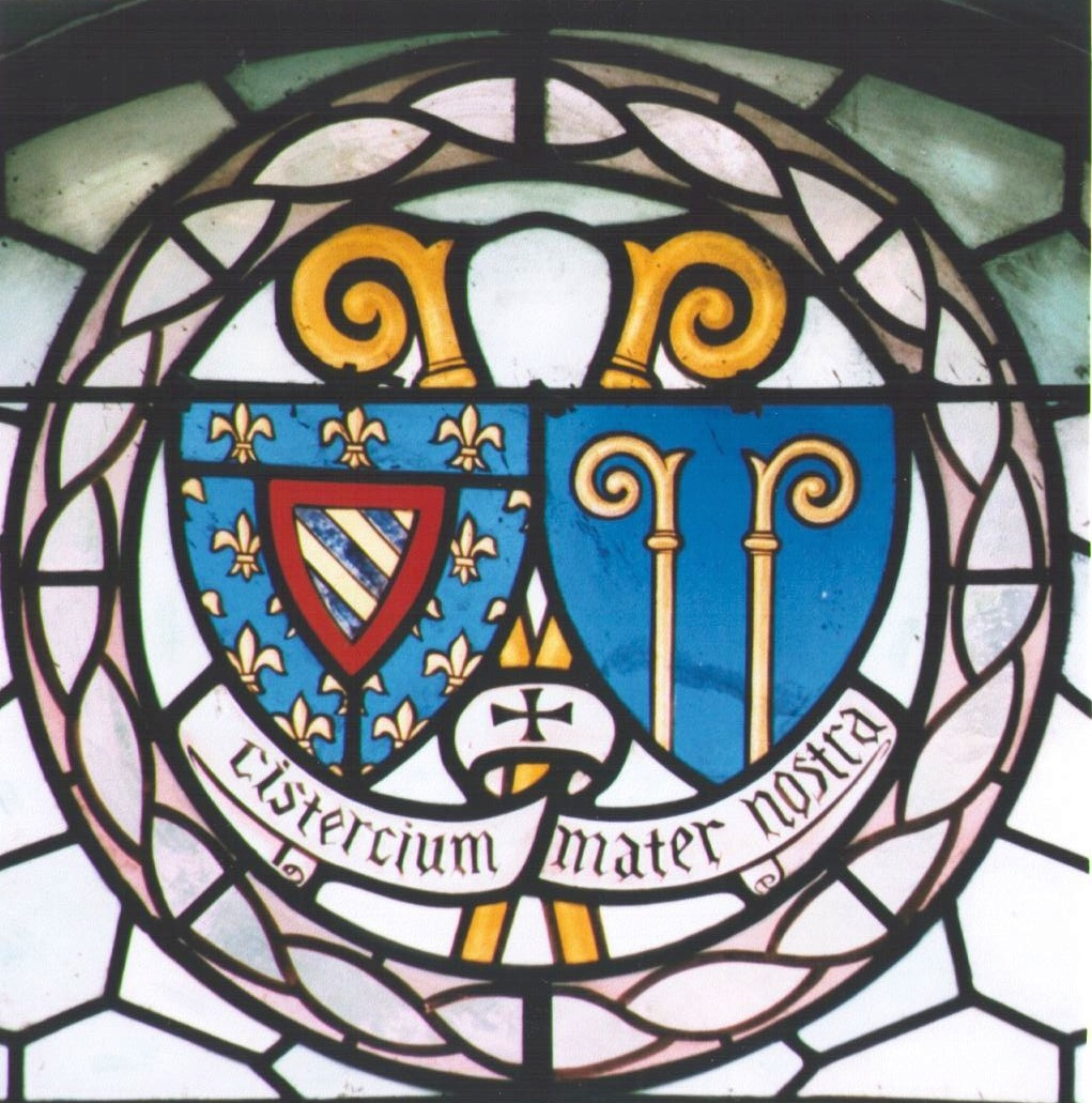 Vitrail de l'Abbaye de Bonnecombe, détail, (du temps de la communauté de l'Arche).